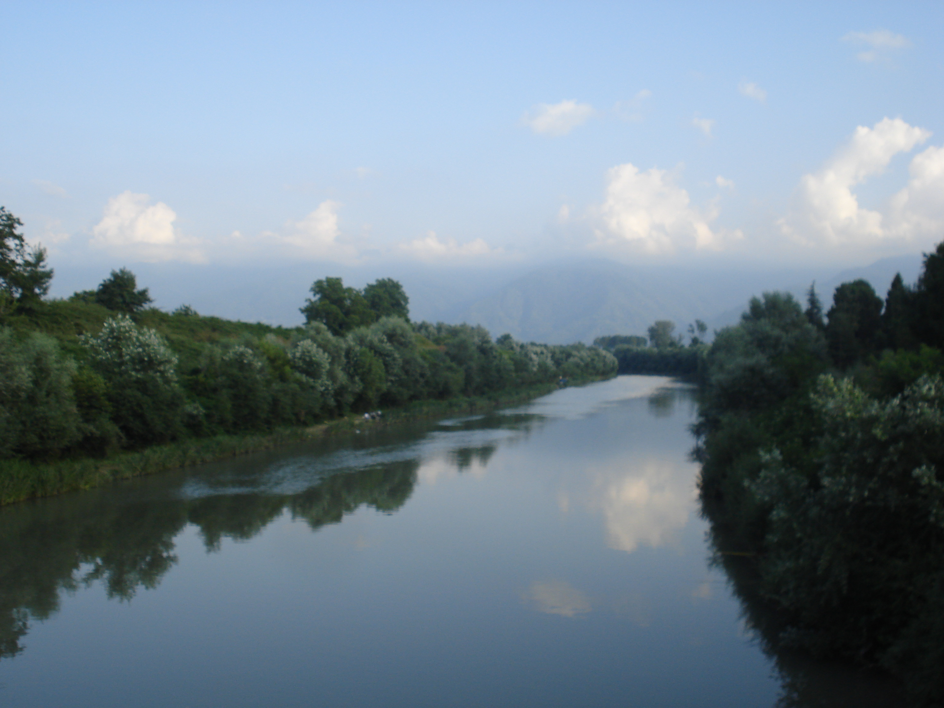 Büyük Melen çayı